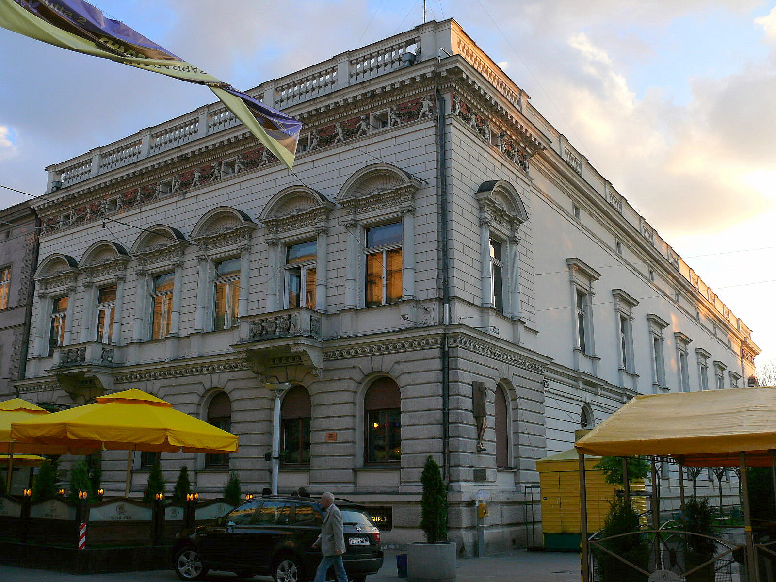 Pałac Maksymiliana Goldfedera przy Piotrkowskiej 77 w Łodzi